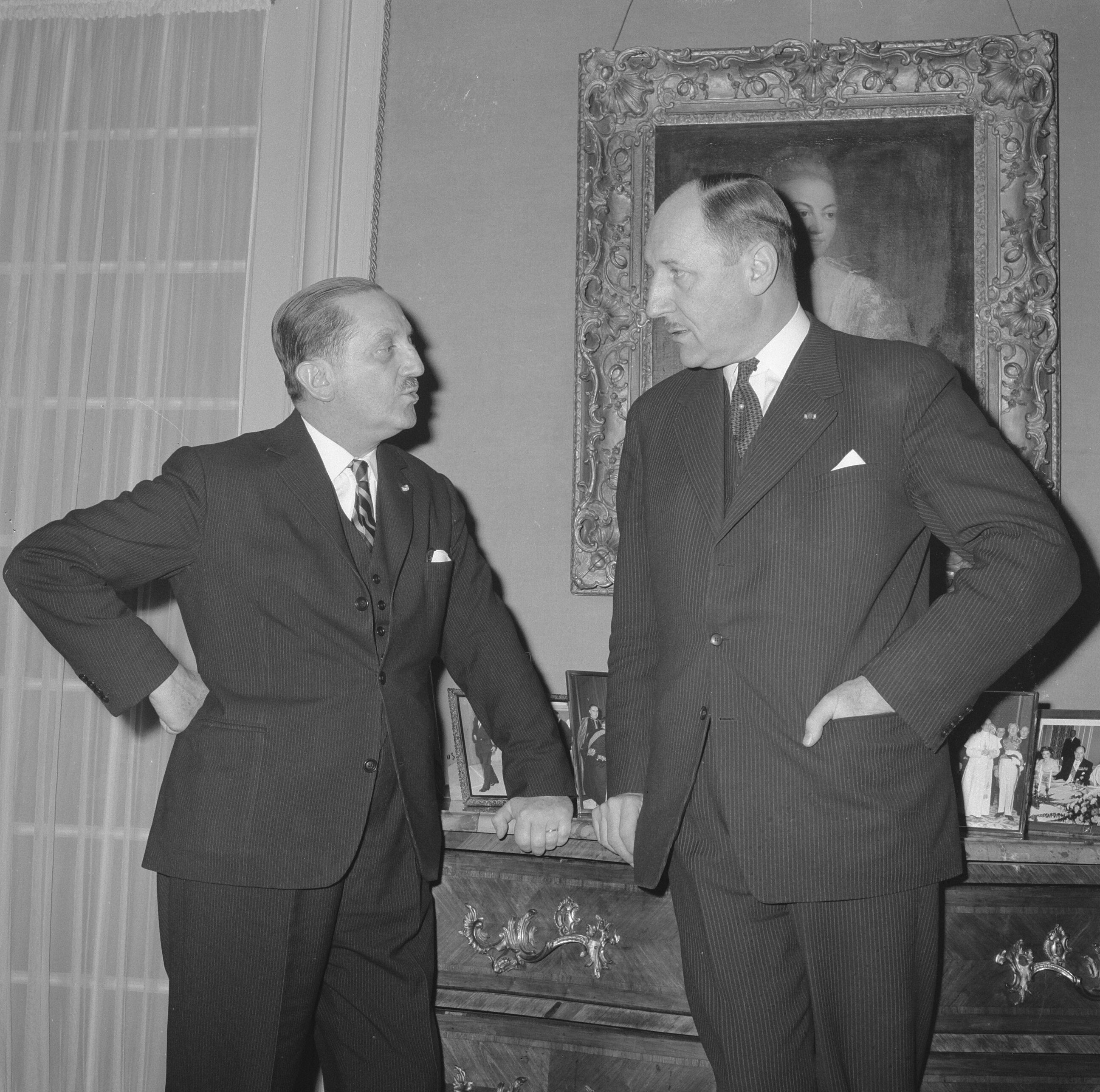 Collectie / Archief : Fotocollectie Anefo Reportage / Serie : [ onbekend ] Beschrijving : Kabinet van Minister-President De Quay conferentie gehouden t.b.v. het bezoek Griekse Minister-President in ons land. Evangelos Averoff en Luns Datum : 28 februari 1963 Trefwoorden : conferenties Persoonsnaam : Caramanlis, Luns, J.A.M.H., Luns, Joseph Fotograaf : Nijs, Jac. de / Anefo Auteursrechthebbende : Nationaal Archief Materiaalsoort : Negatief (zwart/wit) Nummer archiefinventaris : bekijk toegang 2.24.01.03 Bestanddeelnummer : 914-8813